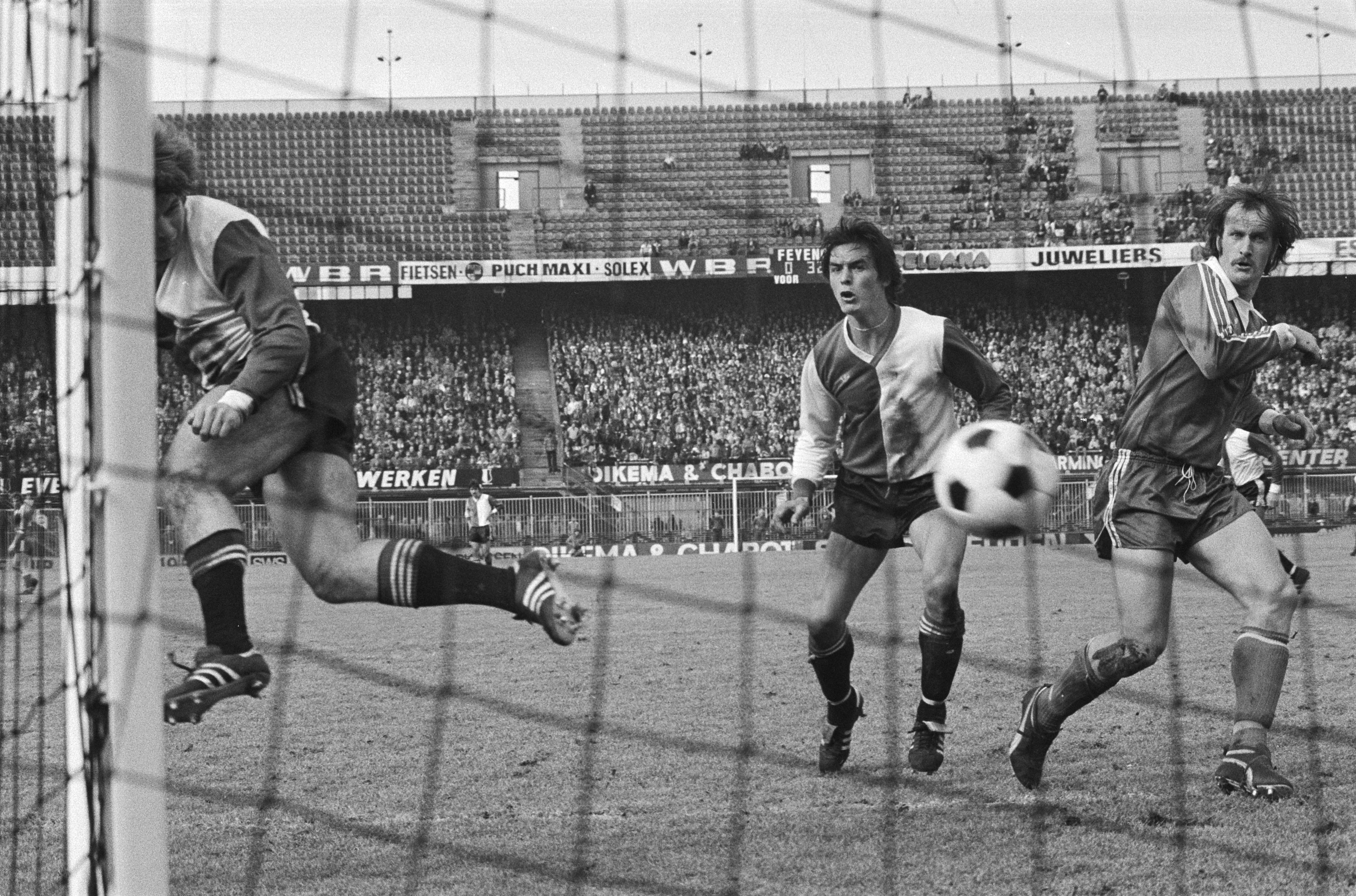 Collectie / Archief : Fotocollectie Anefo Reportage / Serie : Feijenoord tegen Sparta 4-1 Beschrijving : Wim Van Til (links) scoort het eerste doelpunt, midden Jan Peters , rechts Ton Marijt (Sparta) Datum : 4 maart 1979 Locatie : Rotterdam, Zuid-Holland Trefwoorden : sport, voetbal Persoonsnaam : Marijt, Ton, Peters, Jan, Van Til, Wim Fotograaf : Suyk, Koen / Anefo Auteursrechthebbende : Nationaal Archief Materiaalsoort : Negatief (zwart/wit) Nummer archiefinventaris : bekijk toegang 2.24.01.05 Bestanddeelnummer : 930-1481